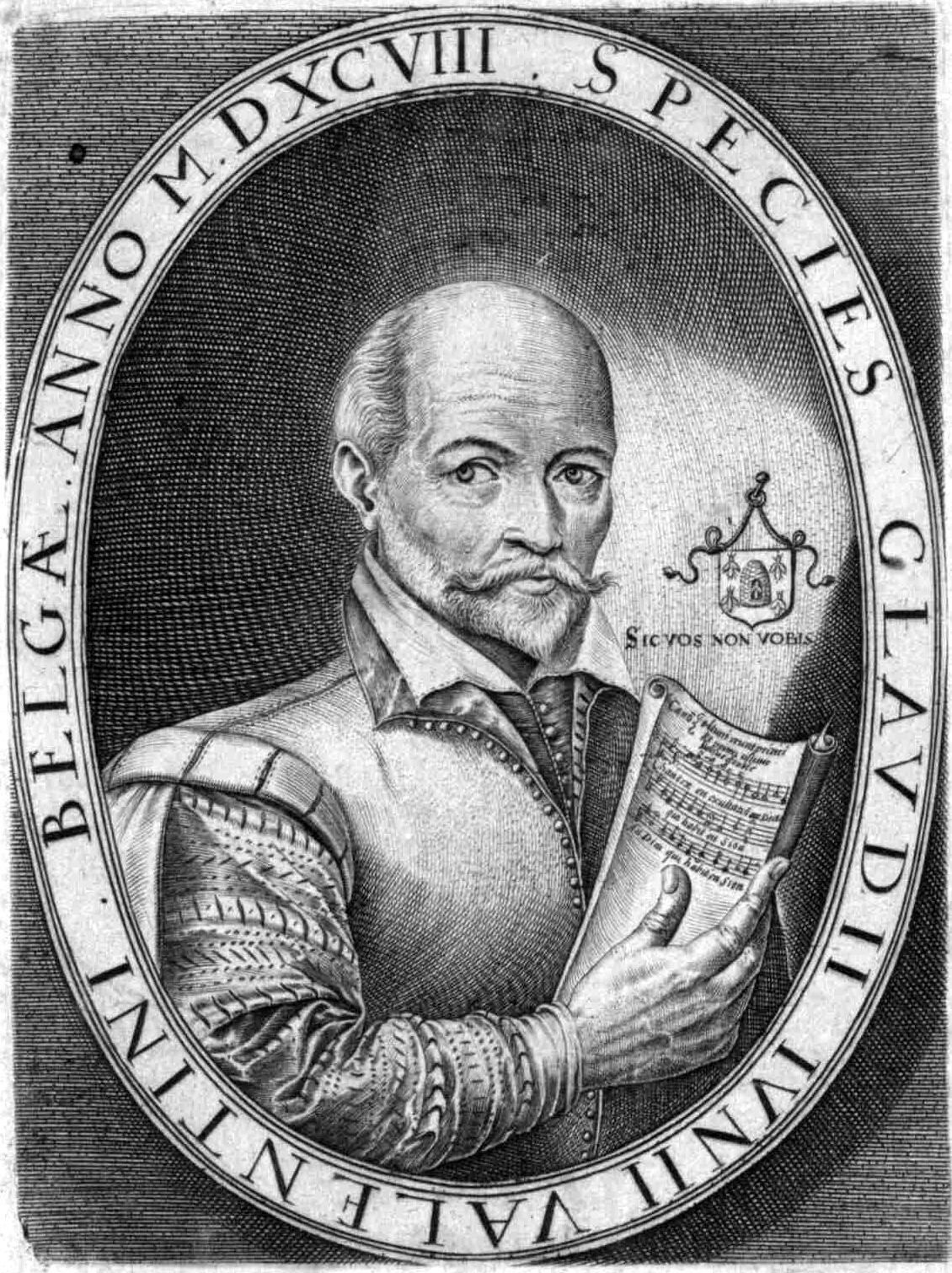 Depicted person: Claude Le Jeune